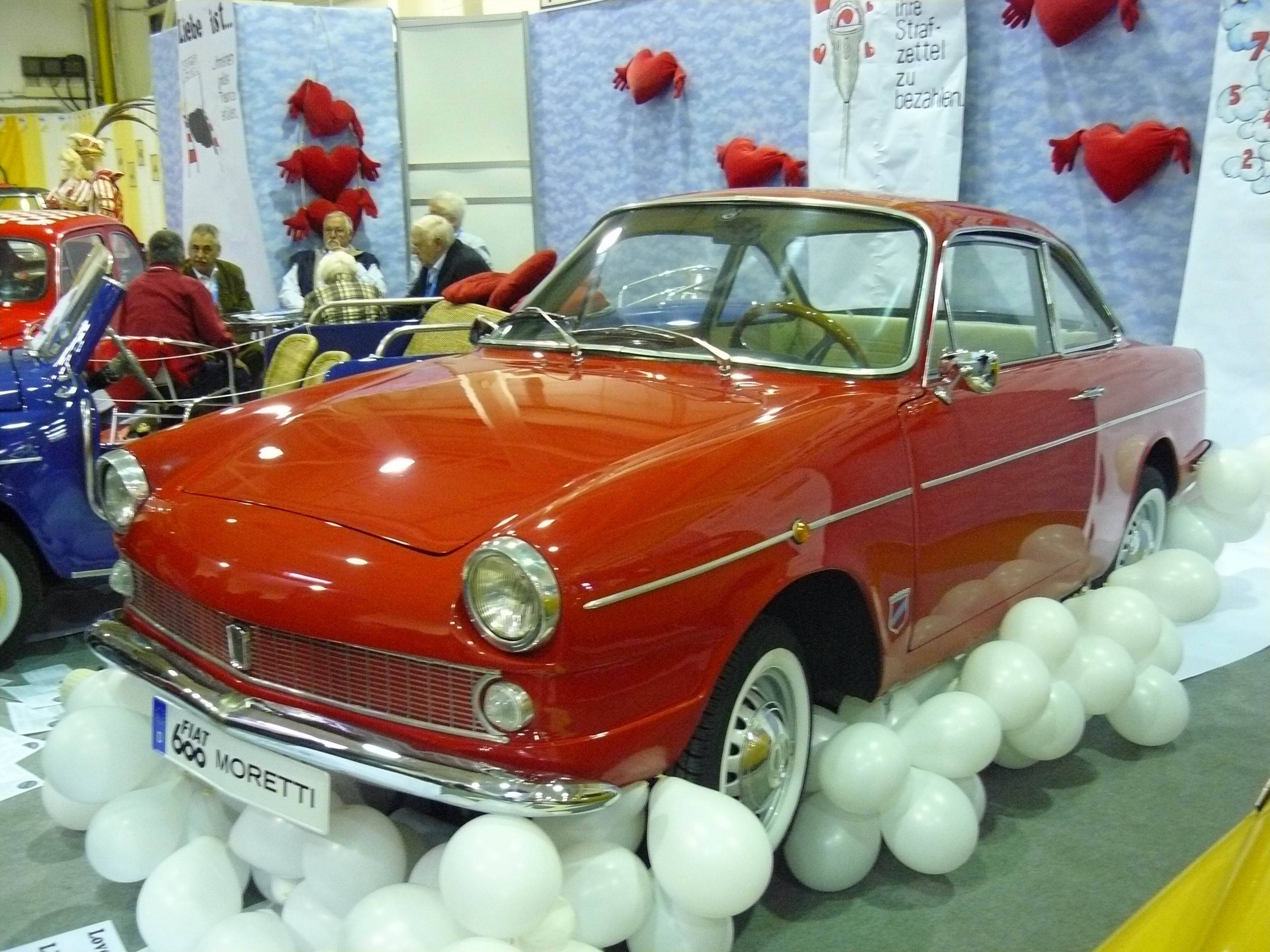 Essen 2011